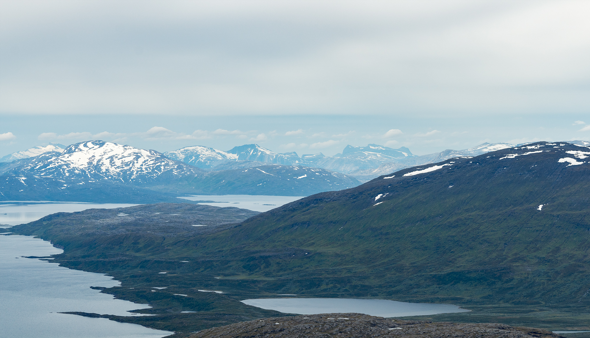 Ajajávrre längst ner i mitten. Berget till höger är Allak.